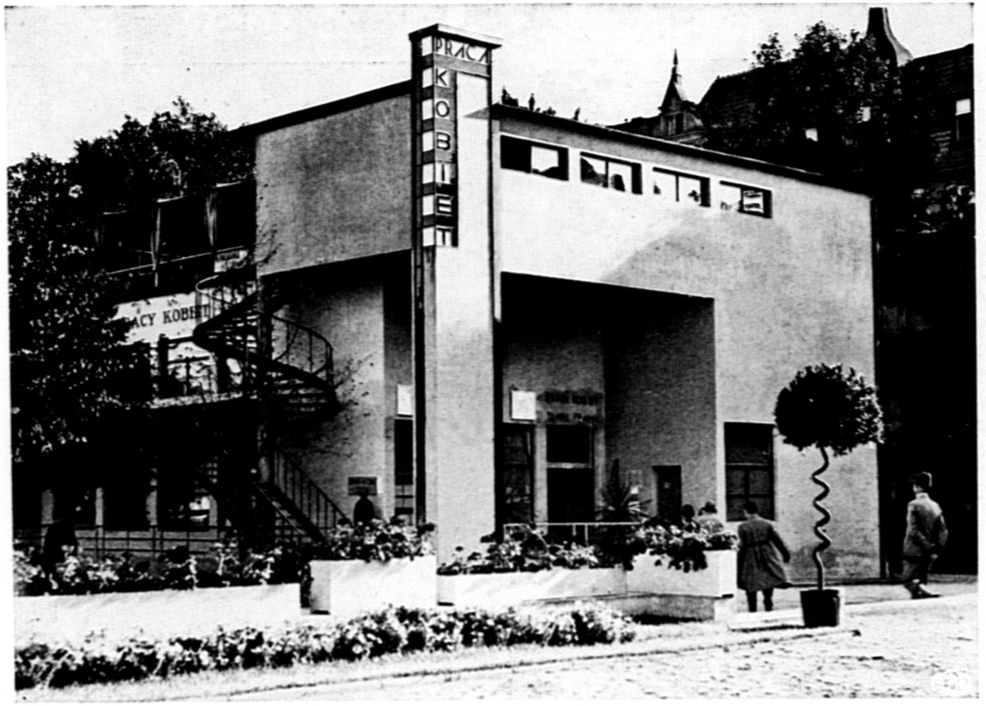 Architektura modernistyczna w Polsce (Anatolia Hryniewicka-Piotrowska).